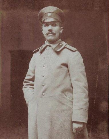 Георги Попхристов по време на Балканските войни